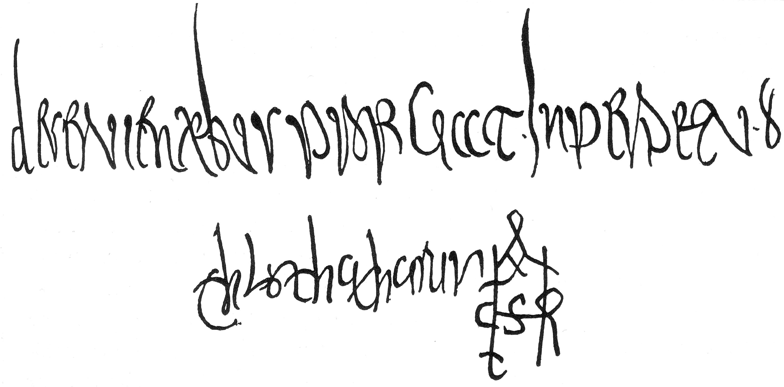 Souscription de Clotaire II (584-629) au bas d'un diplôme de 625.